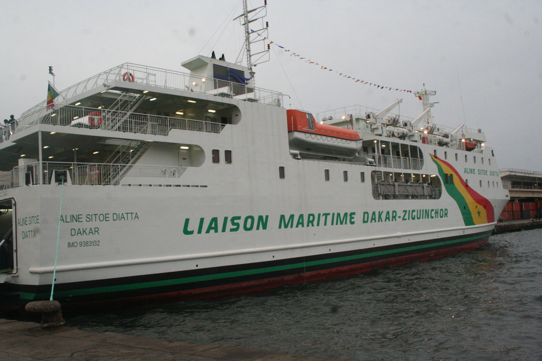 Le bateau Aline Sitoé Diatta assurant la liaison Dakar-Ziguinchor depuis 2008, en remplacement du Wilis IMO Number: 9383132 MMSI Number: 663036000 Callsign: 6WIX Length: 76 m Beam: 16 m